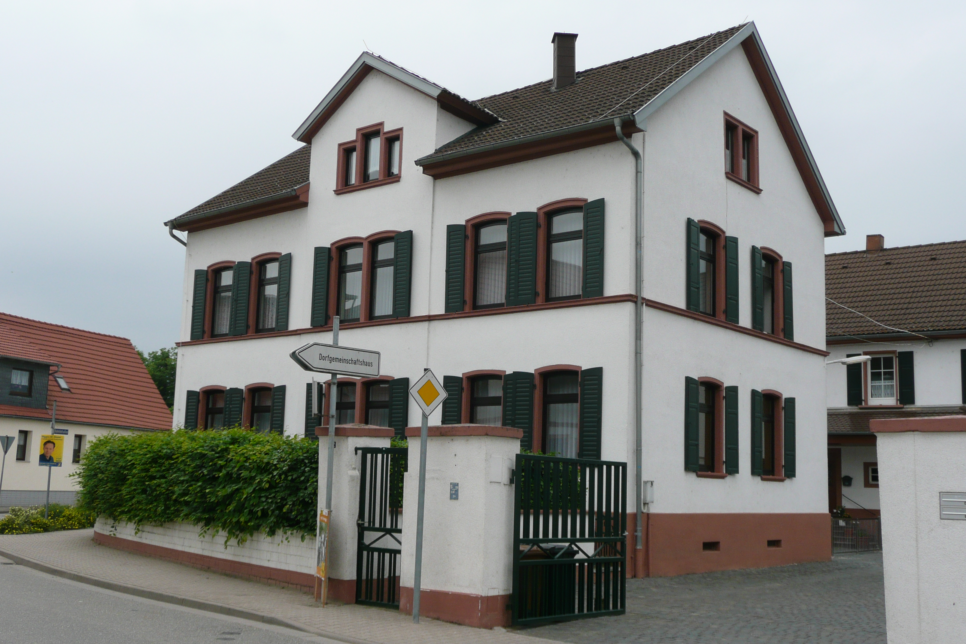 Geburtshaus_der_Berta_Laisé,_verh._mit_Dr._Adam_Karrillon.JPG